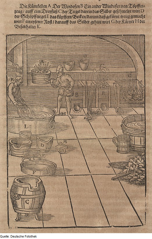 Original image description from the Deutsche Fotothek Metallurgie & Probierkunst & Silber & Erz & Körnen & Windofen & Schmelztiegel